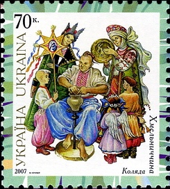 Марка з серії "Народний одяг України" 2007 Хмельниччина. Коляда